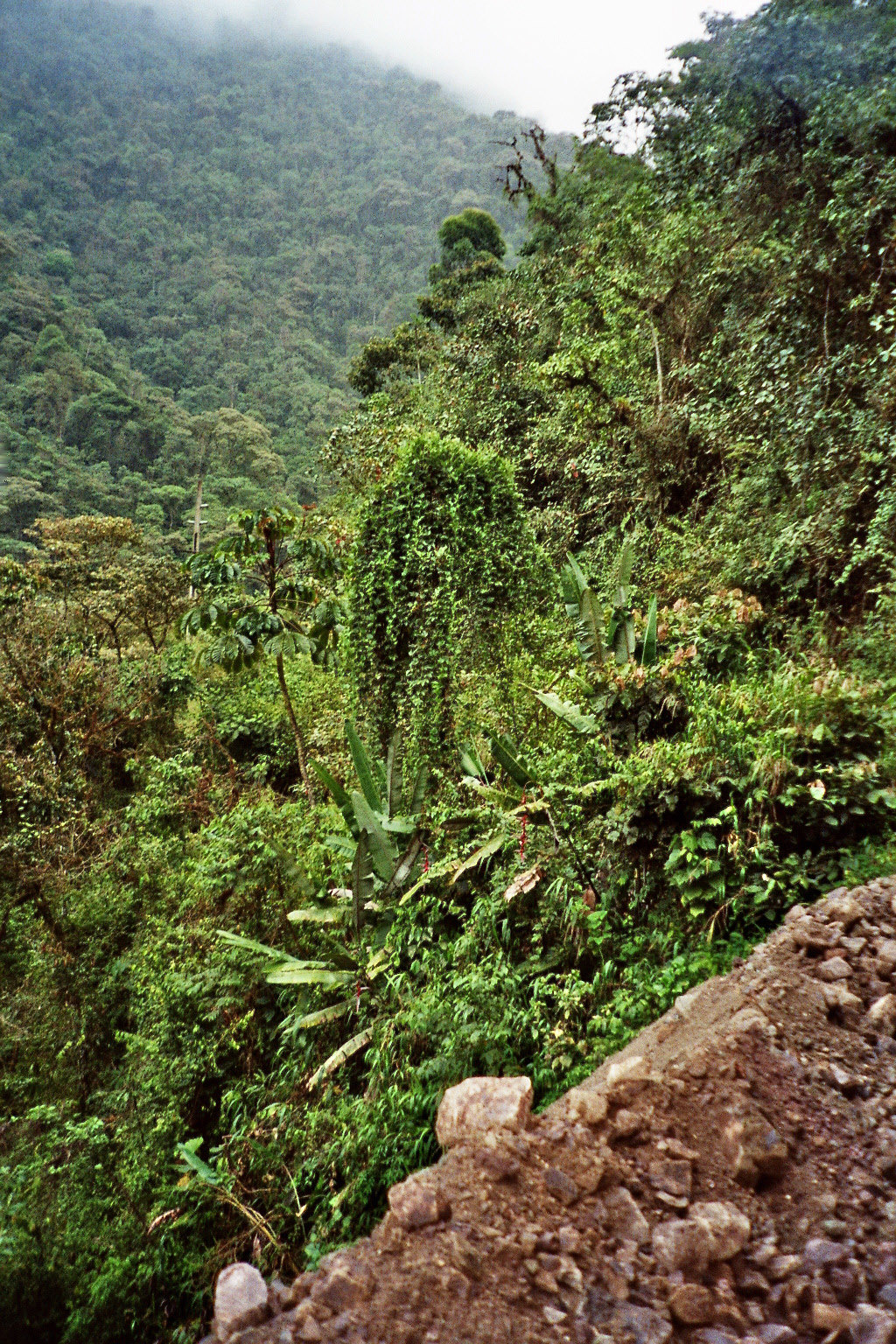 Cloud forest near Mindo, Ecuador